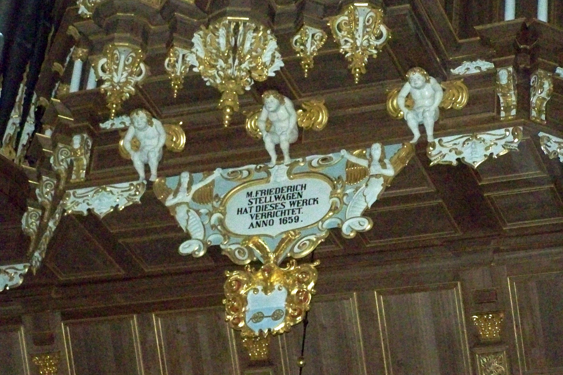 Stralsund, Marienkirche, Stellwagen-Orgel, Detail (2008-10-02)